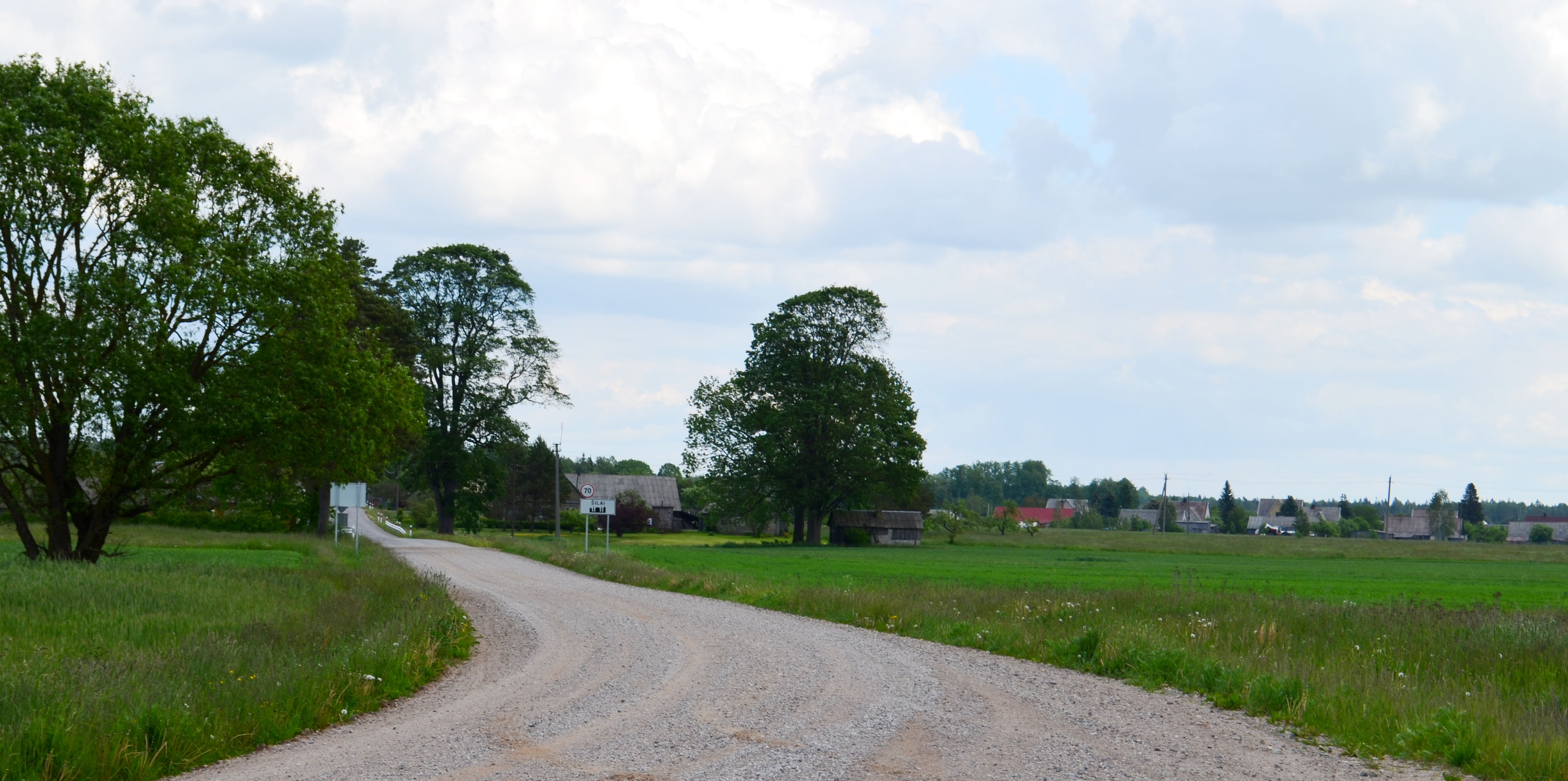 Šilai (atvažiuojant nuo Vadoklių), Panevėžio raj.